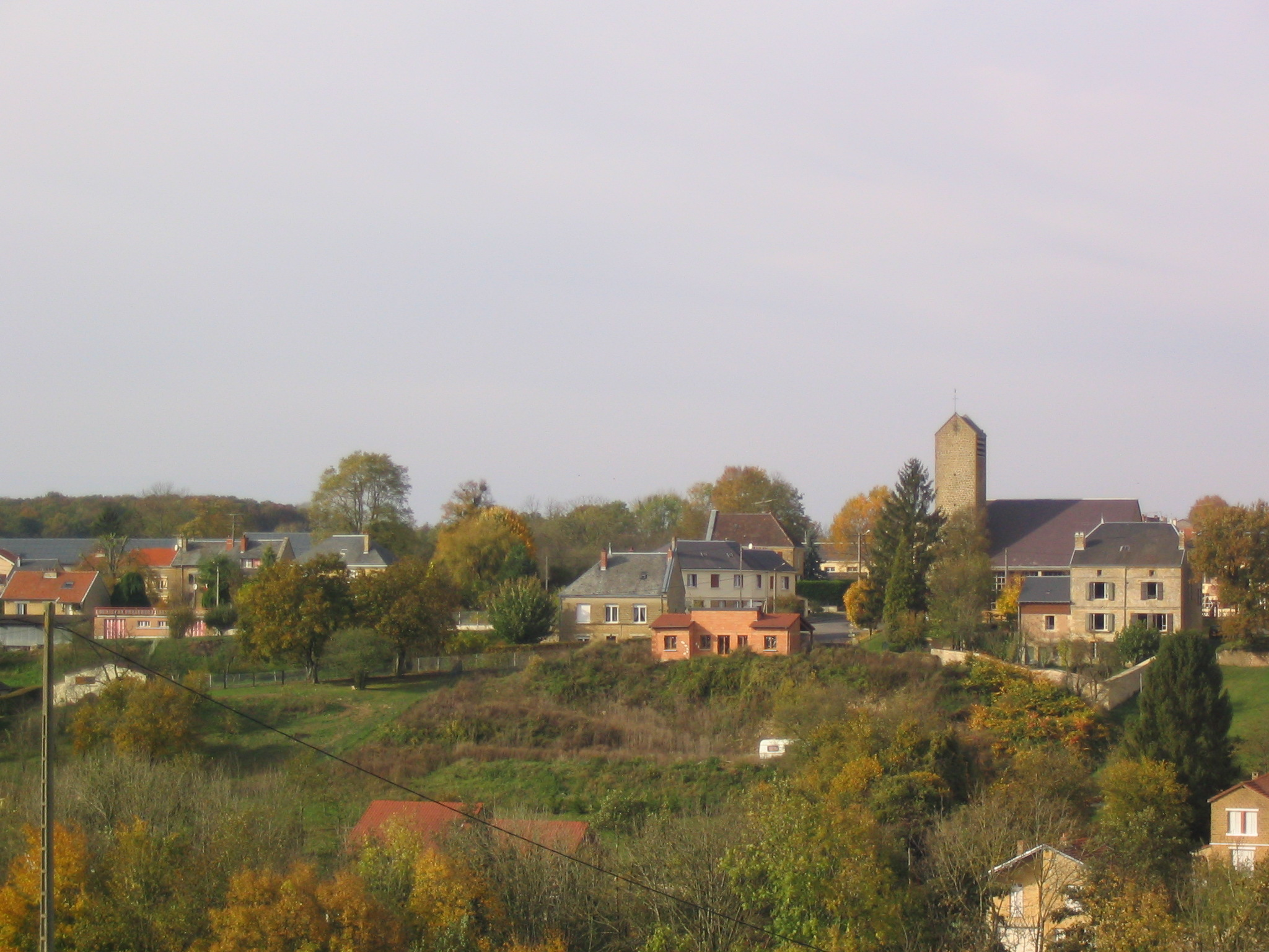 vue de Neuville-Day